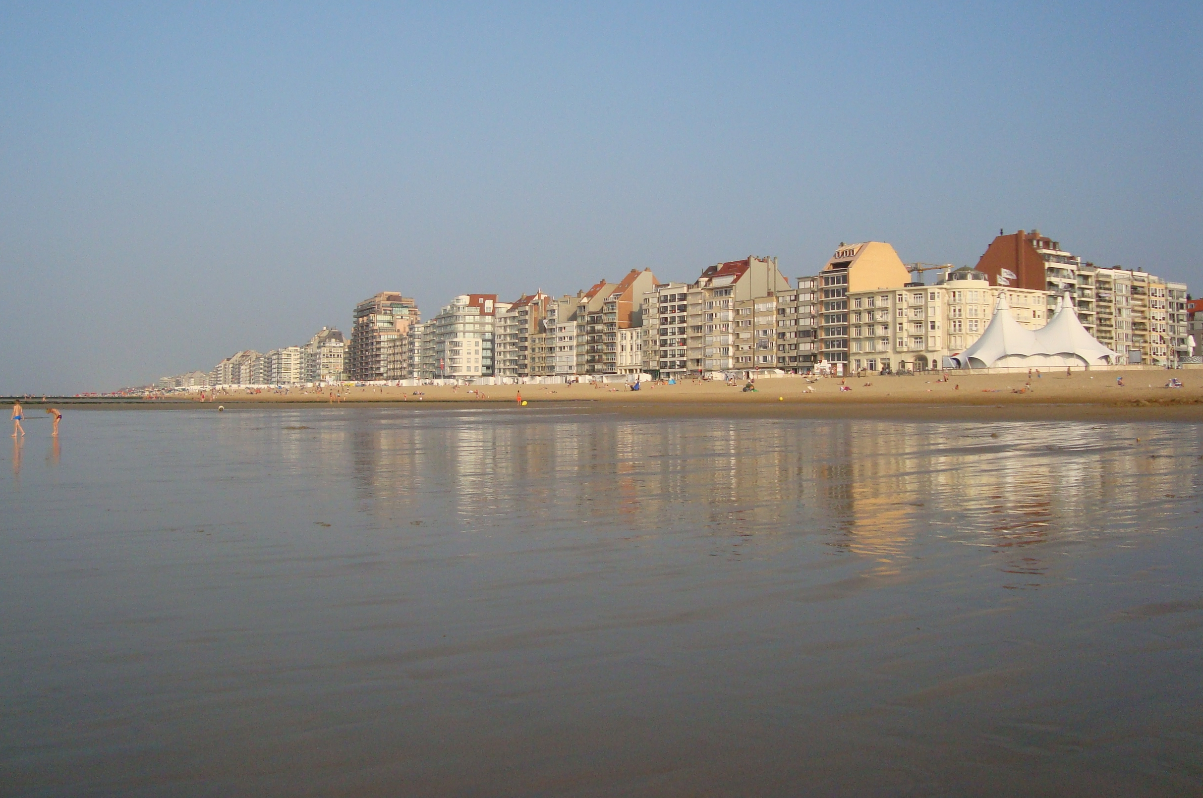 La plage de Knokke (Belgique).